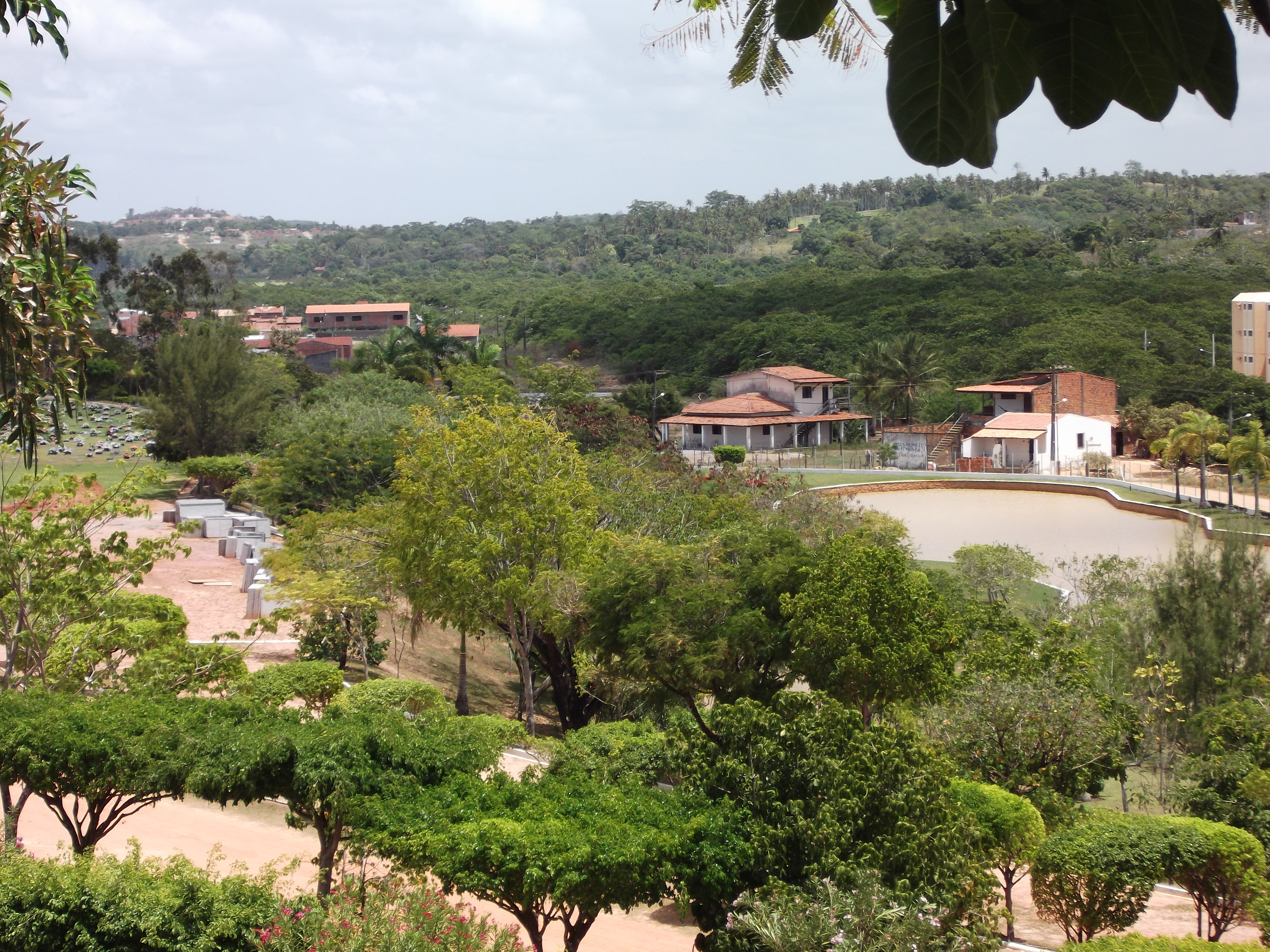 Cemitério Colina da Saudade, Jabotiana, Aracaju-SE